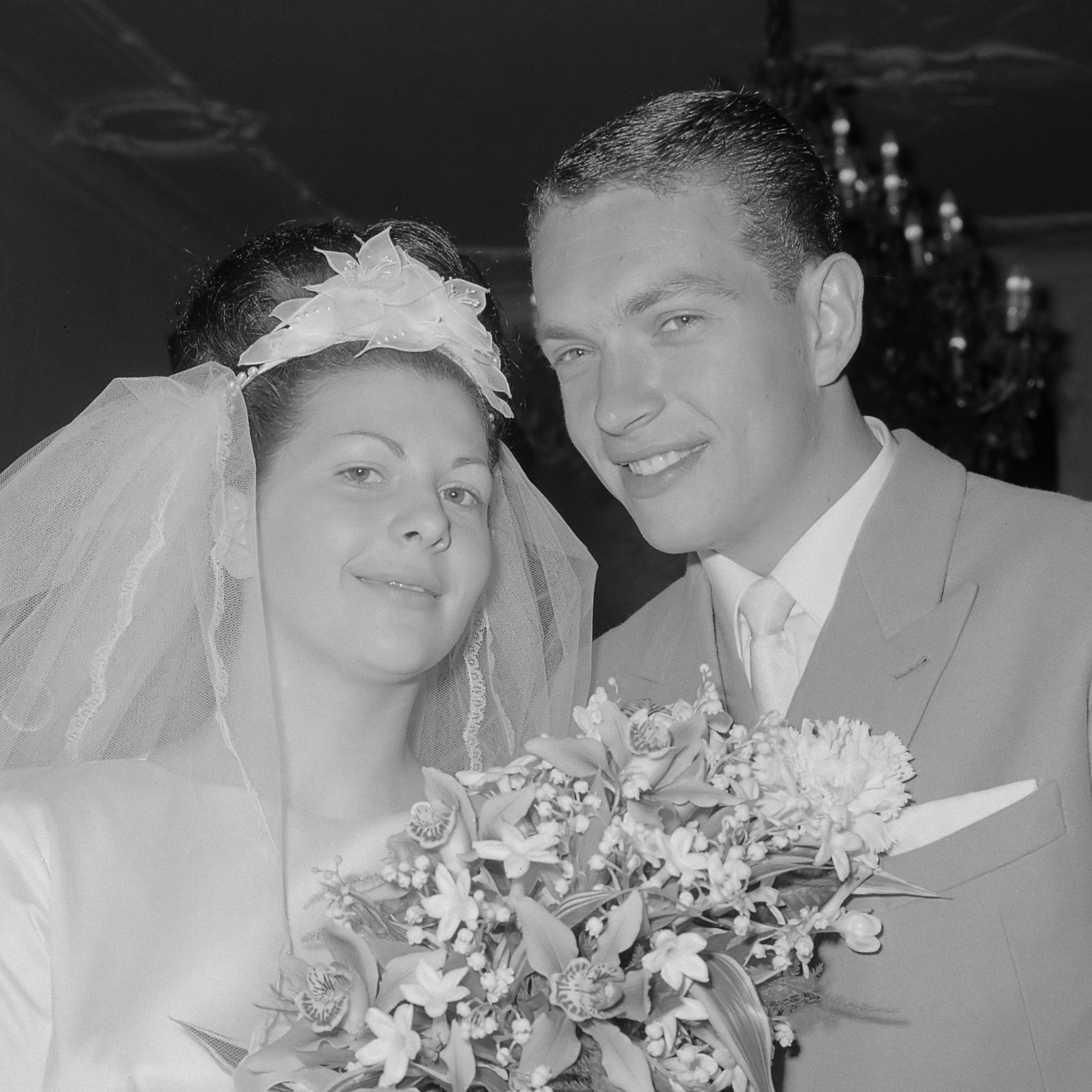 Prins Bernhard bracht bezoek aan Breda, hier op het stadhuis, de Prins feliciteert het bruidspaar Korebits (keeper NAC) 7 mei 1965